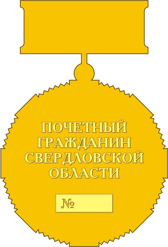 нагрудный знак к почётному званию Почётный гражданин Свердловской области (реверс)